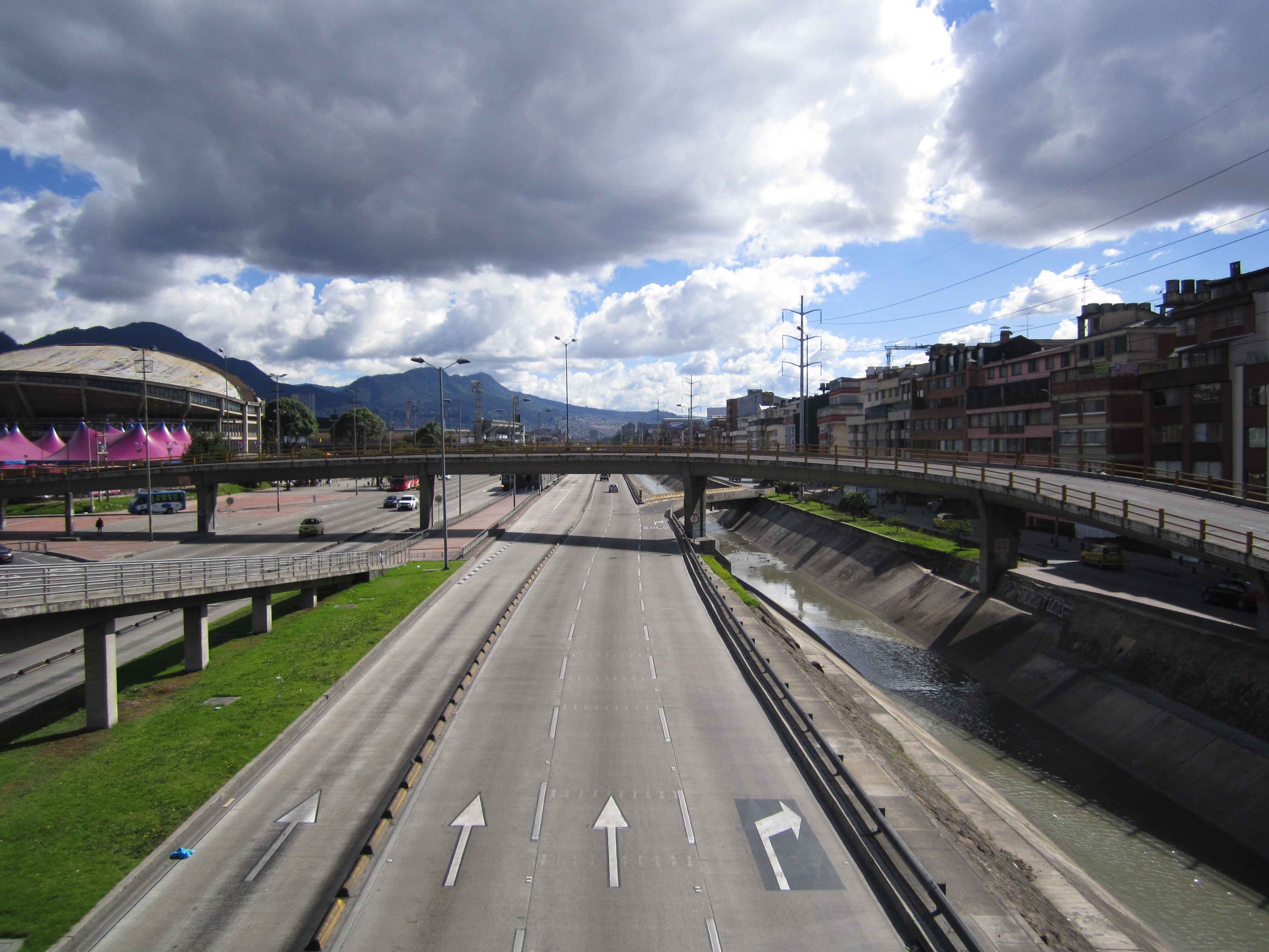 Carril central de la avenida NQS (30 o Quito) cerca del coliseo El Campín (a la izquierda) y de la estación de TM del mismo nombre.